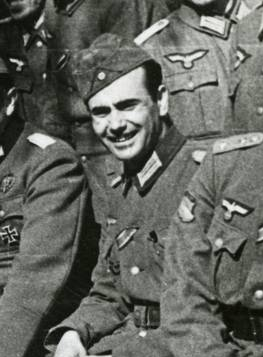 Cor. Rodrigo, García [...], García Allés. (aproximadamente 1941-1943)